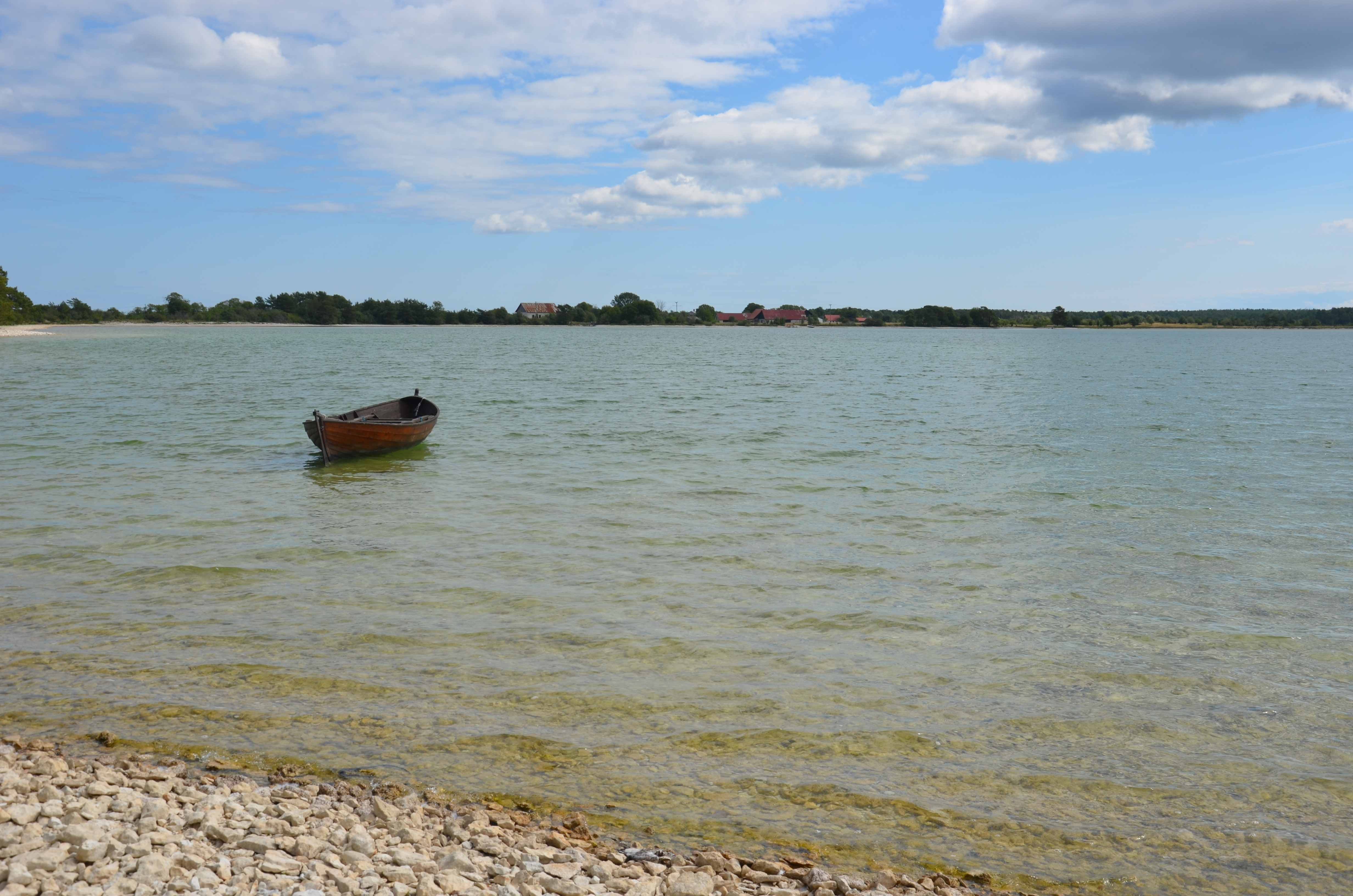 Bästeträsk från stranden i nordväst mot Ar